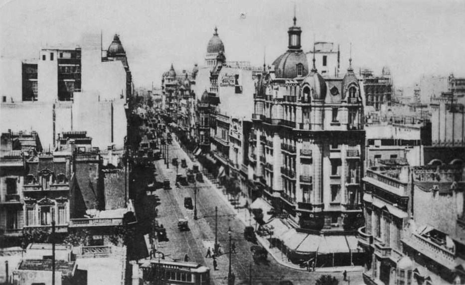 Vista de la Avenida Callao mirando hacia el sur. Se ve en primer plano el cruce con la calle Corrientes y un edificio de estilo francés diseñado por el arquitecto Auguste Plou. Al fondo se destaca la cúpula del Congreso de la Nación Argentina, frente a la Plaza de los Dos Congresos.